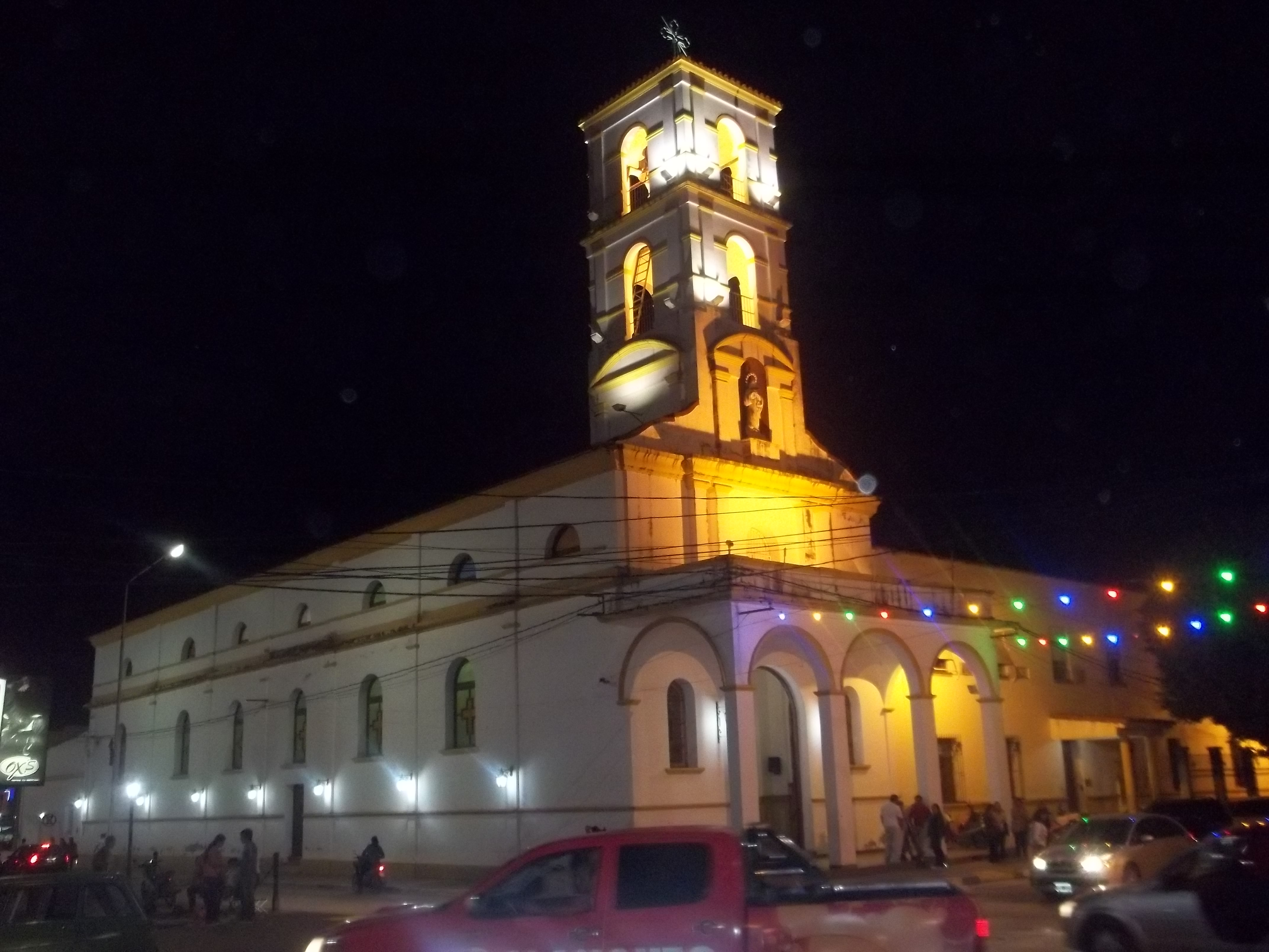 Principal templo católico de Tartagal, Salta. Fotografía tomada desde la plaza San Martín de noche.